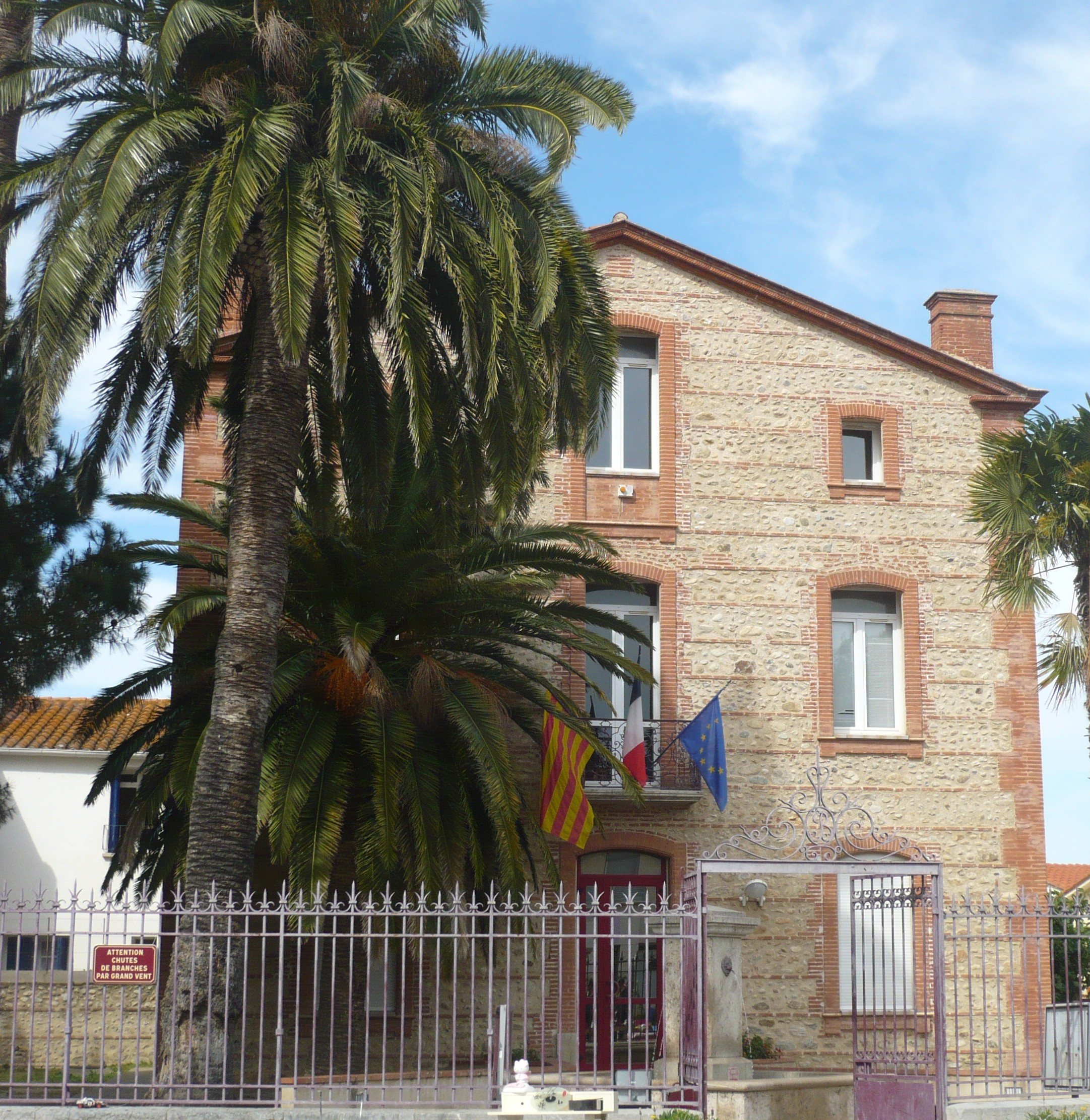 La mairie de Montescot